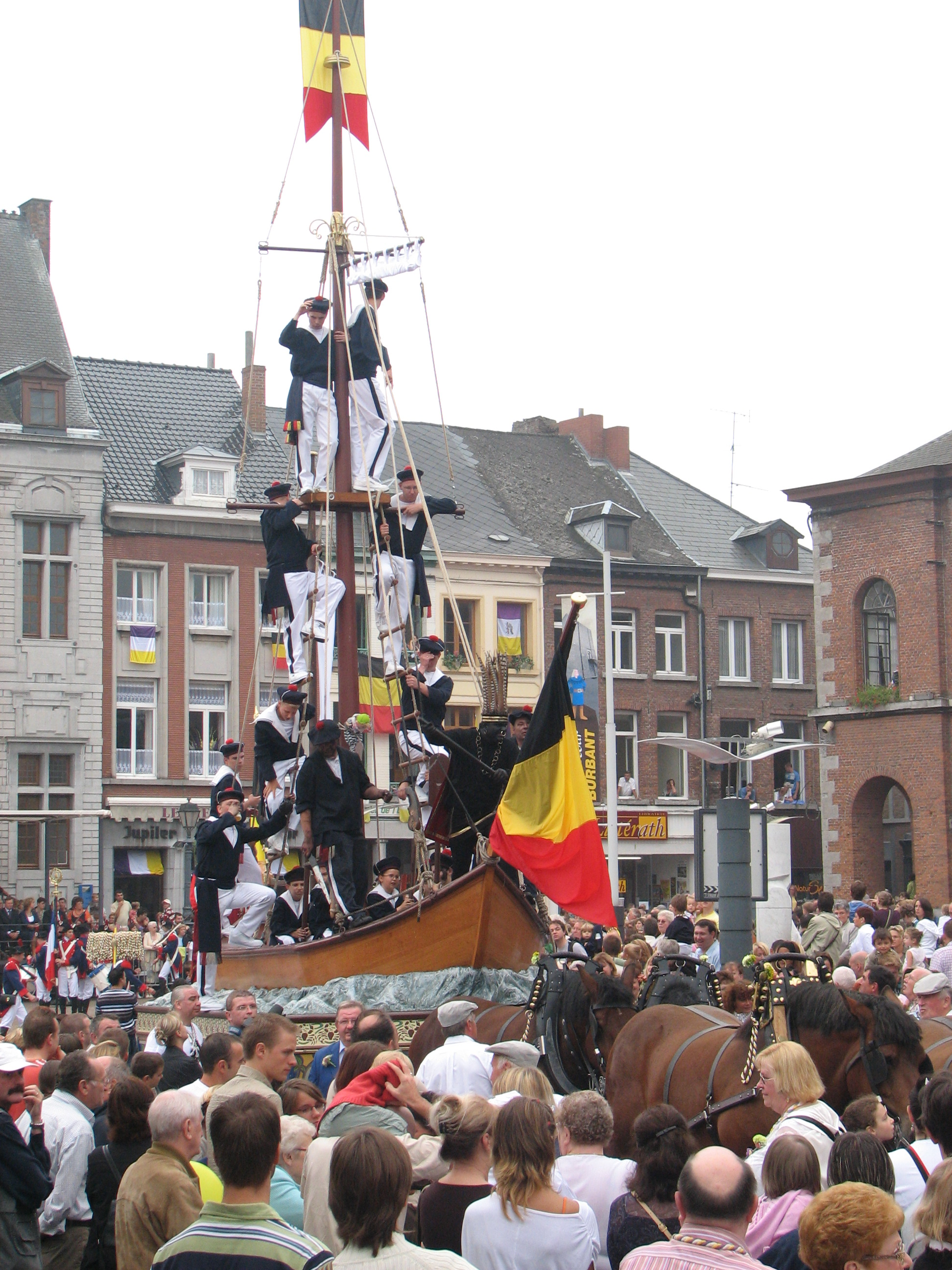 La barque des pecheurs napolitains dans le cortège de la Ducasse d'Ath, 2007